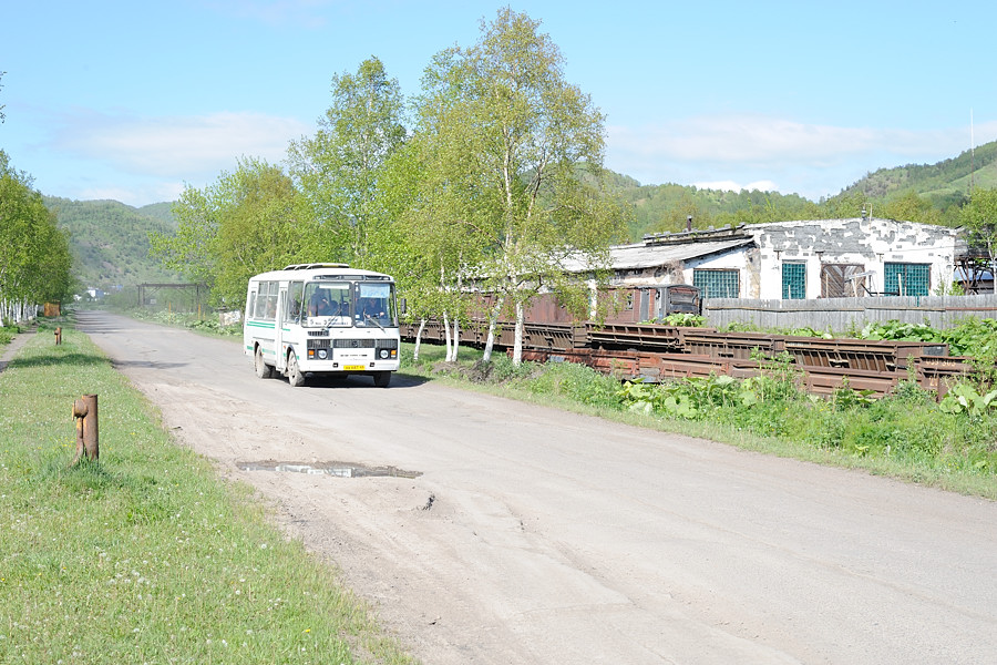 Betriebshof des OOO Lokomotiw im Norden von Schachtjorsk